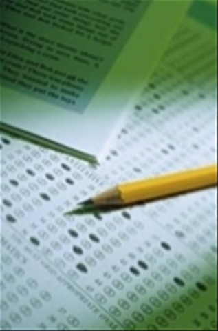 Ejemplo de un cuestionario